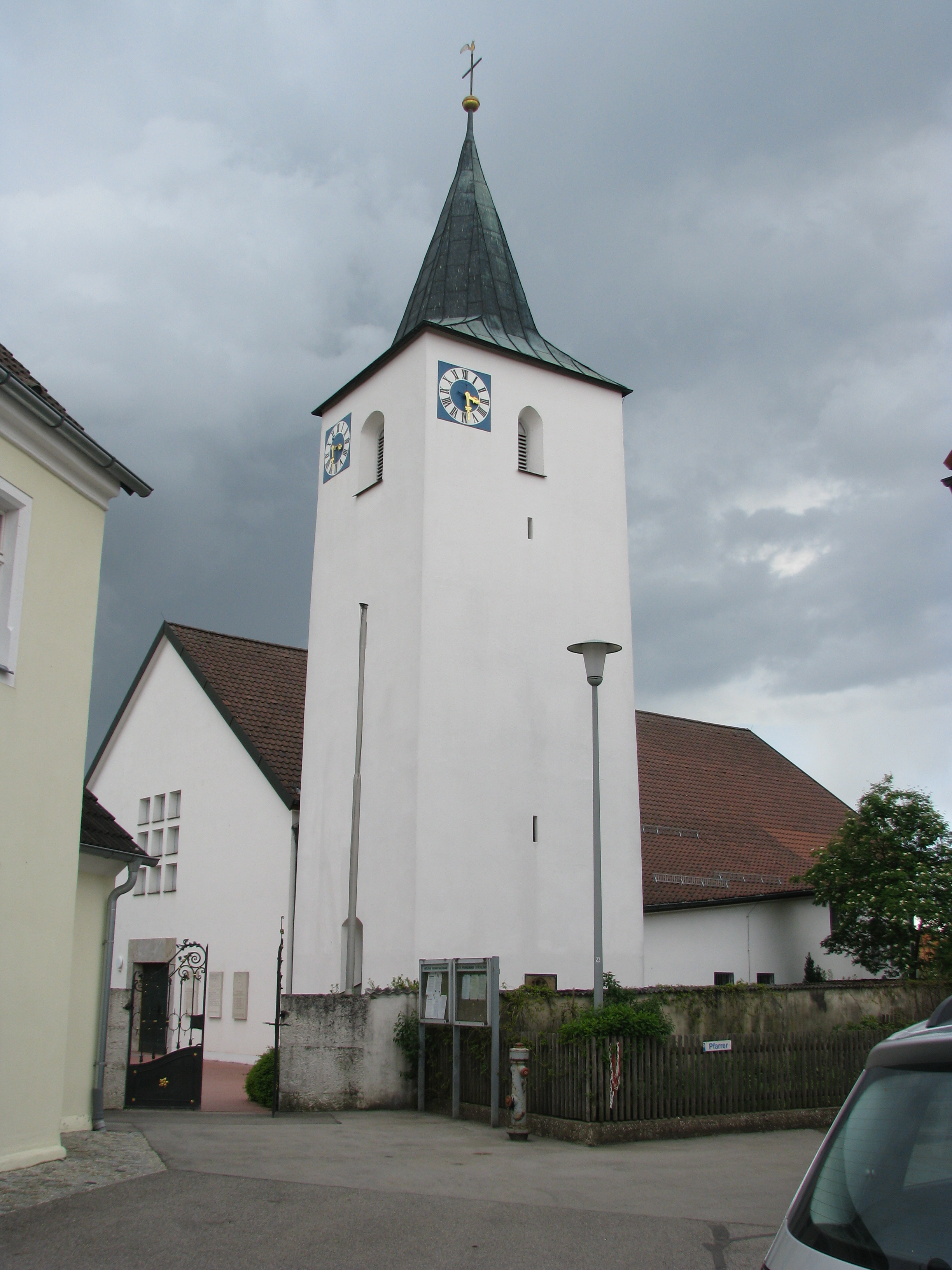 Stöckelsberg, Ortsteil der Gemeinde Berg bei Neumarkt in der Oberpfalz, kath. Pfarrkirche SS. Simon und Judas Thaddäus